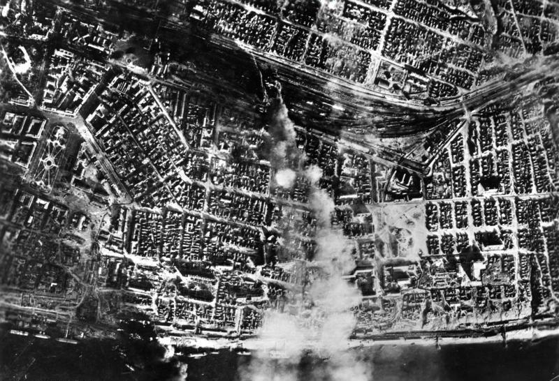 Russland, Kampf um Stalingrad, Luftangriff ADN-ZB/Archiv II. Weltkrieg 1939-45 Schlacht um Stalingrad vom Juli 1942 bis Februar 1943. Deutsche Aufnahme eines Bahnhofs in Stalingrad nach der Bombardierung durch Flugzeuge der faschistischen deutschen Luftwaffe, Ende August 1942 5061-42 [Sowjetunion.- Schlacht um Stalingrad]